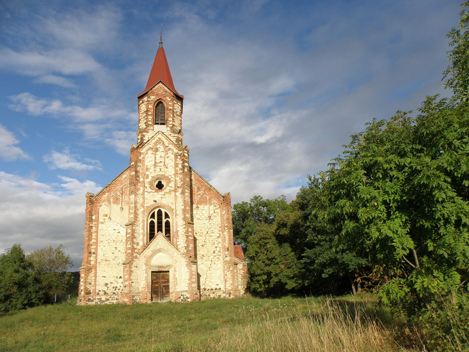 Kostel sv. Augustina (Lužice), na okraji obce, Lužice